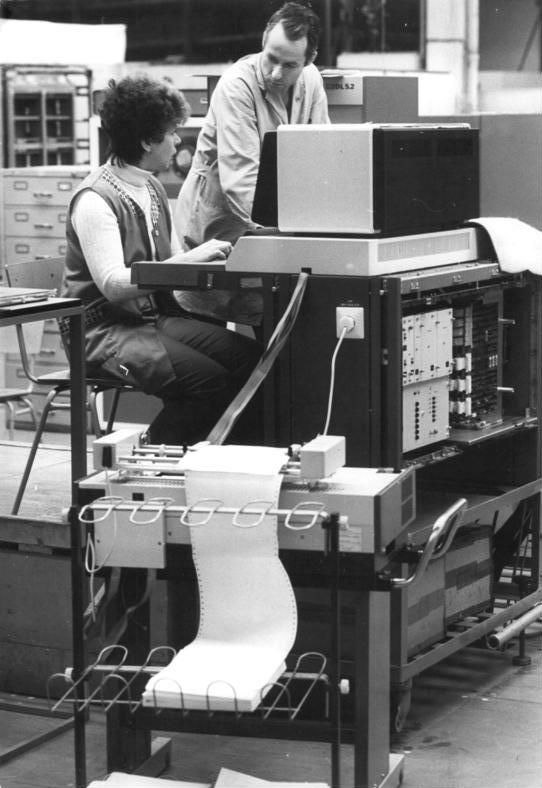 VEB Robotron Elektronik Dresden, Qualitätskontrolle ADN-ZB Hiekel 28.11.84 Dresden: Wettbewerb- Die Werktätigen des VEB Robotron-Elektronik Dresden, Stammbetrieb des VEB Kombinat Robotron, streben 1985 einen weiteren Leistungszuwachs in der Produktion von Erzeugnissen für die Rationalisierung volkswirtschaftlicher Prozesse und den Export an. Die 400. für die Sowjetunion produzierte elektronische Datenverarbeitungsanlage lieferte der Betrieb kürzlich an das befreundete Land. Im Prüffeld (Foto) wird die Zentraleinheit, das Herzstück der Datenverarbeitungsanlage, kontrolliert. Dipl. Ing. Karl Heinz Slaby und Reparateur Margitta Mescherer arbeiten am Bedien- und Service-Prozesser.